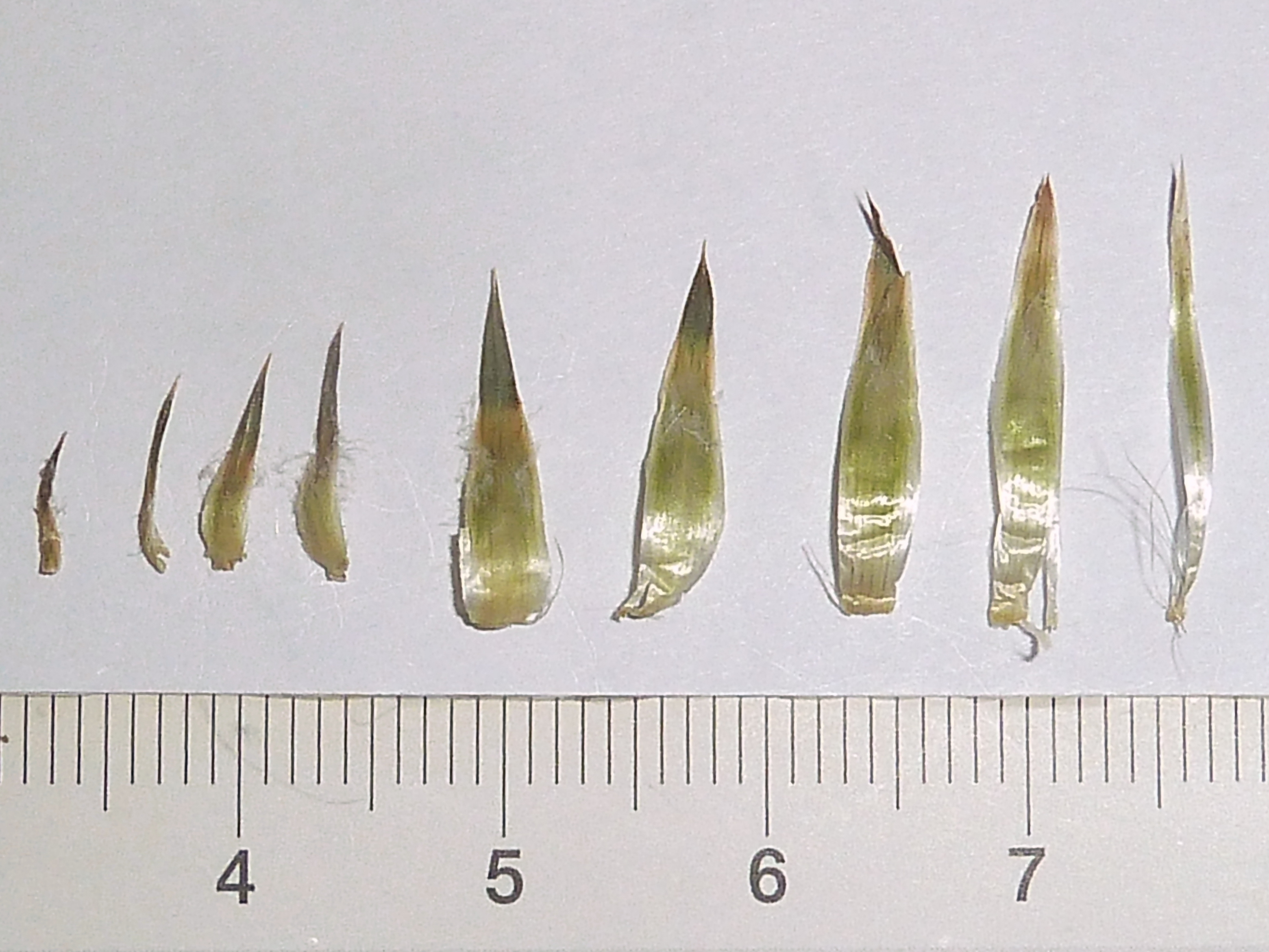 Carduus pycnocephalus - (Cardo, cardo borriquero, cardo negro) - Serie de brácteas involucrales. - Descampado circa Biblioteca, Albatera (Provincia de Alicante, Espàña).